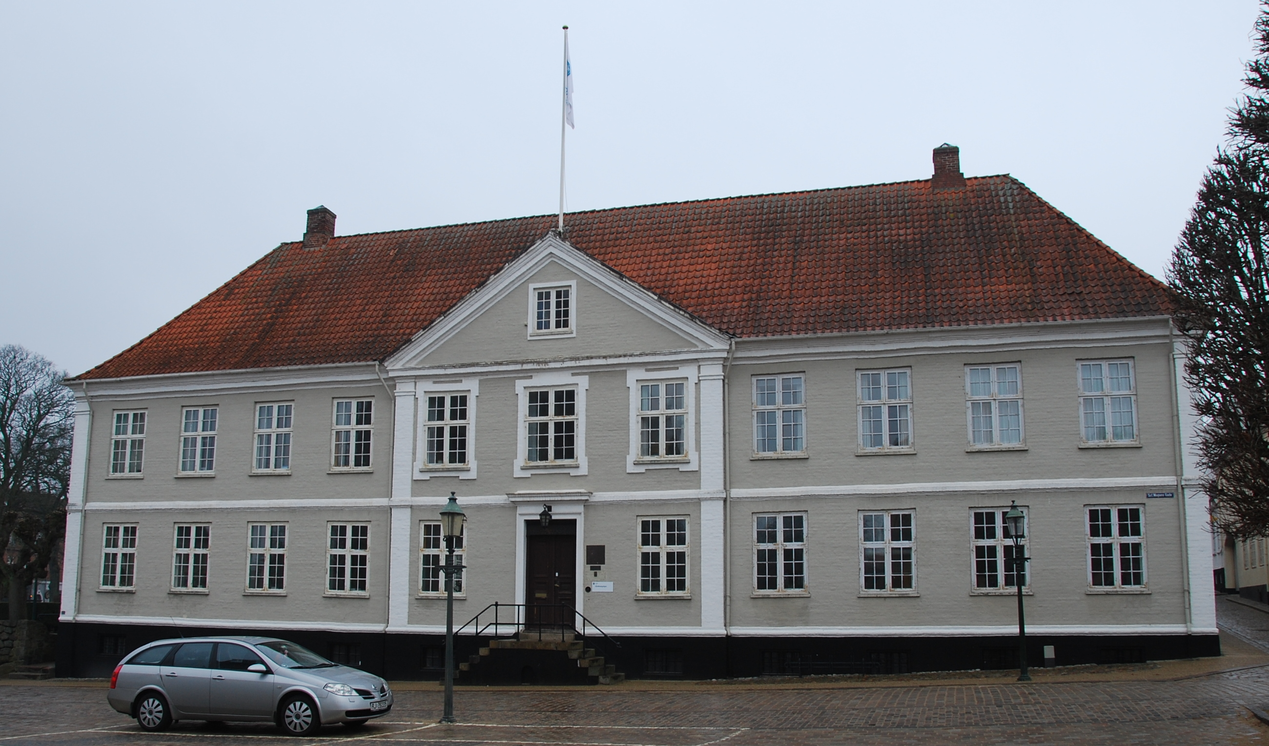 Den fredede bygning "Latinskolen" i Viborg.